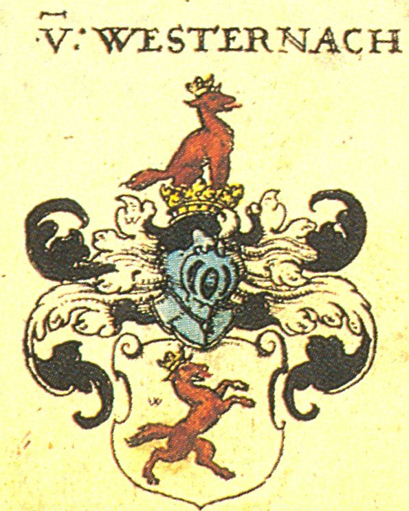 Ritterschaft und Adel in Schwaben von Westernach